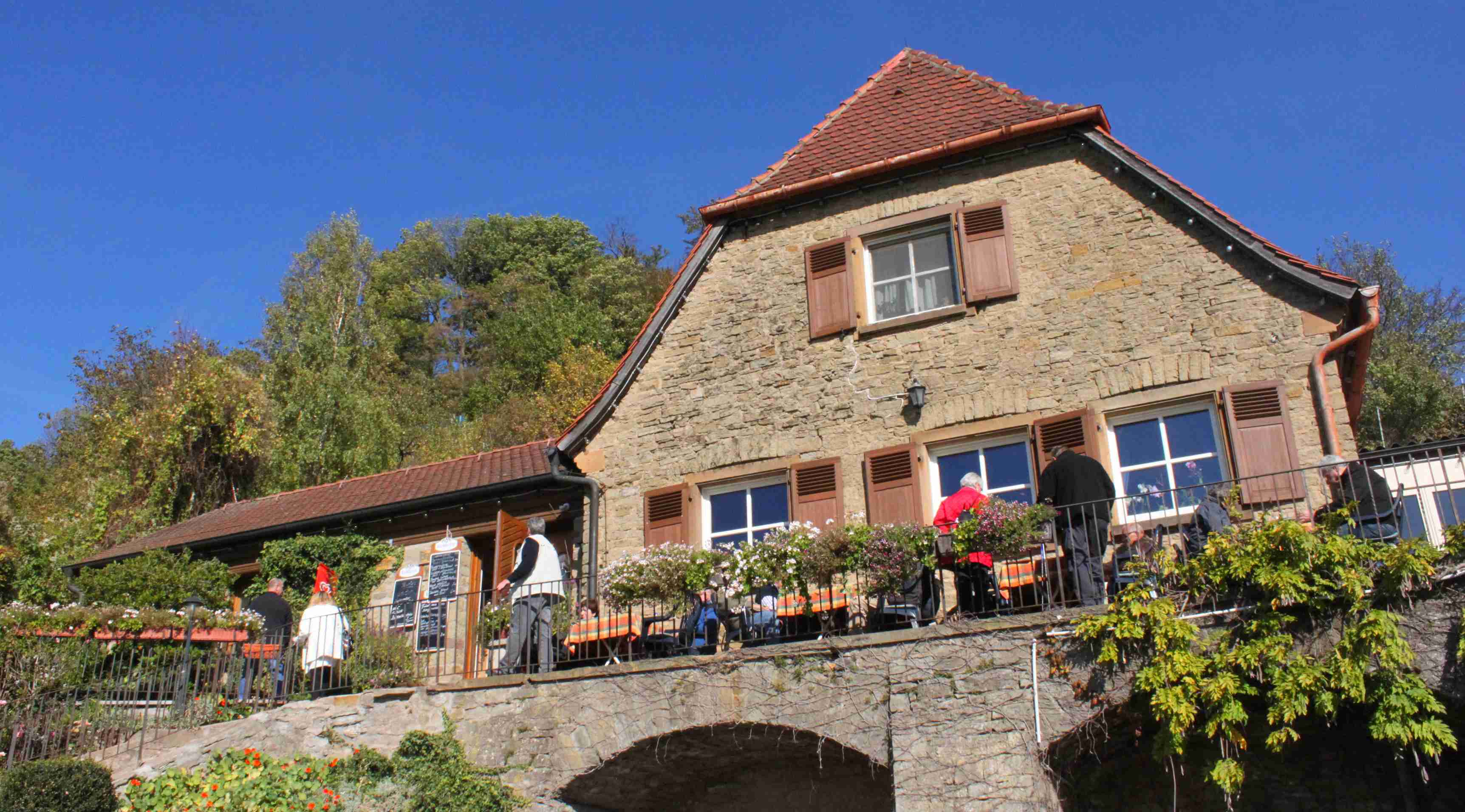 Staatliches Weingut - Weinausschank Stollberg, der Gasthof liegt mitten in den Weingärten auf dem höchsten fränkischen Weinberg auf 440 Metern Höhe, mit genialen Blick über das Land.